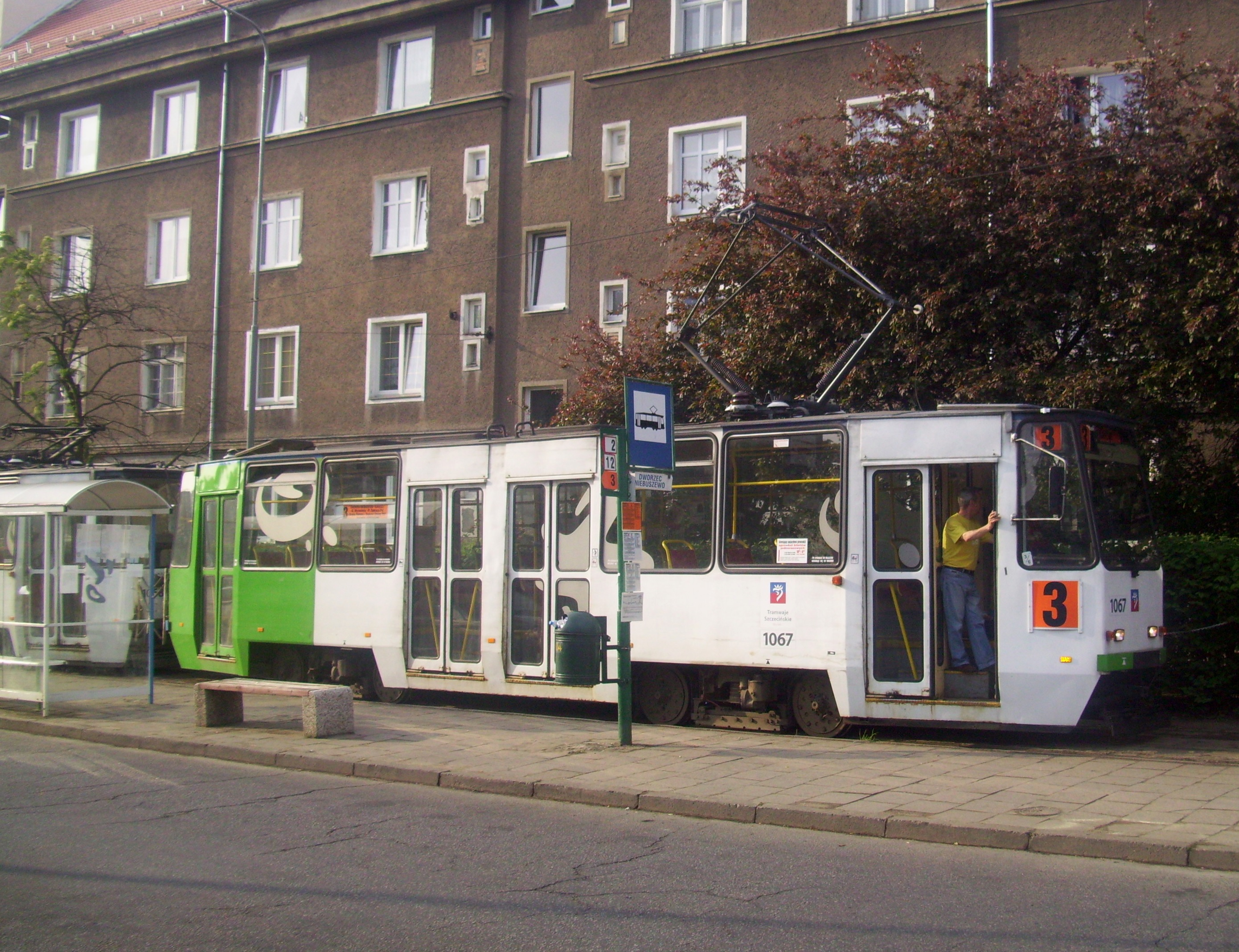 Konstal 105Na 1067+1068, linia tramwajowa nr 3, Szczecin, 2011